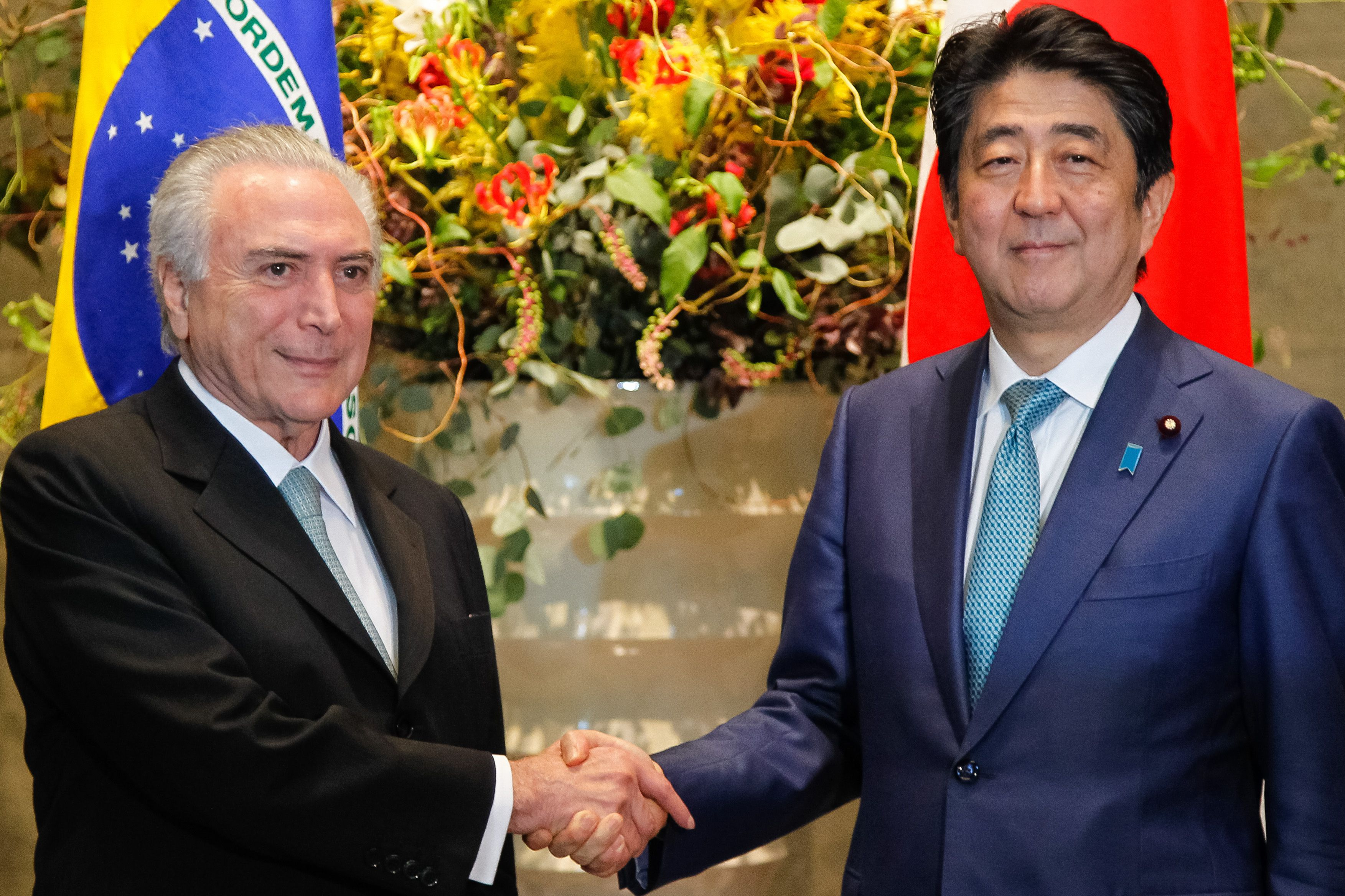 Presidente Michel Temer durante cerimônia em Tóquio com o primeiro-ministro Shinzō Abe